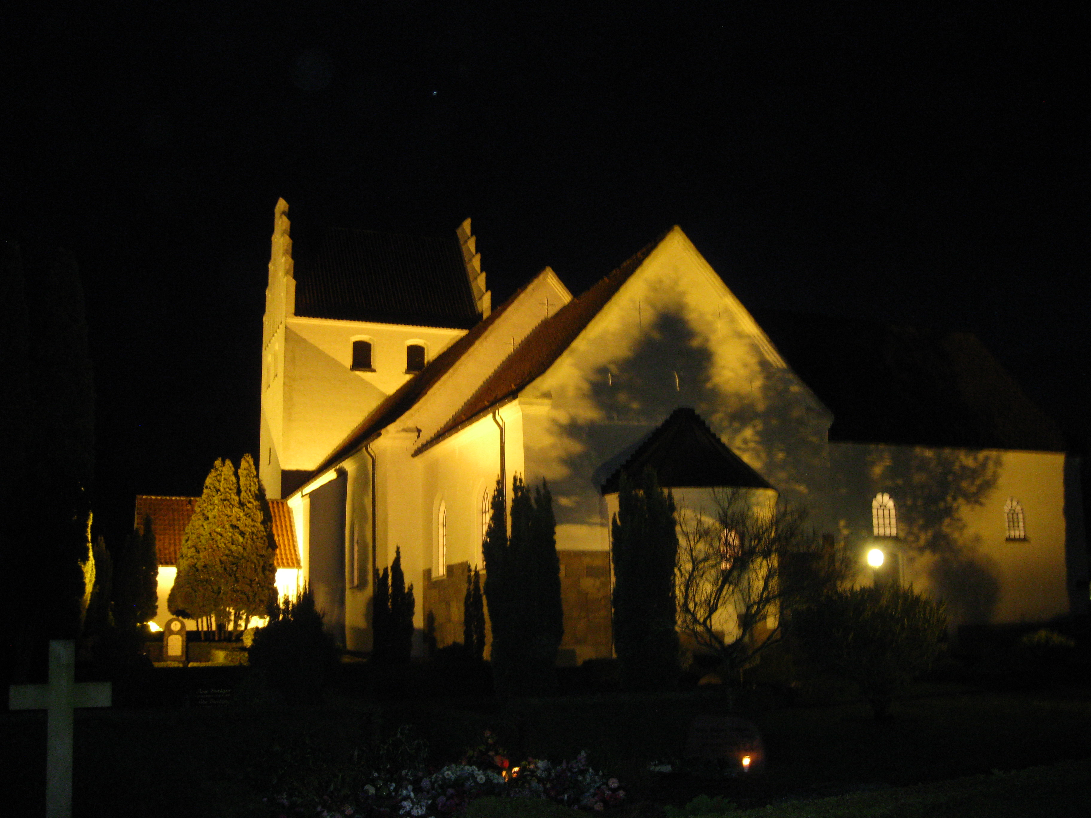 Rårup kirke